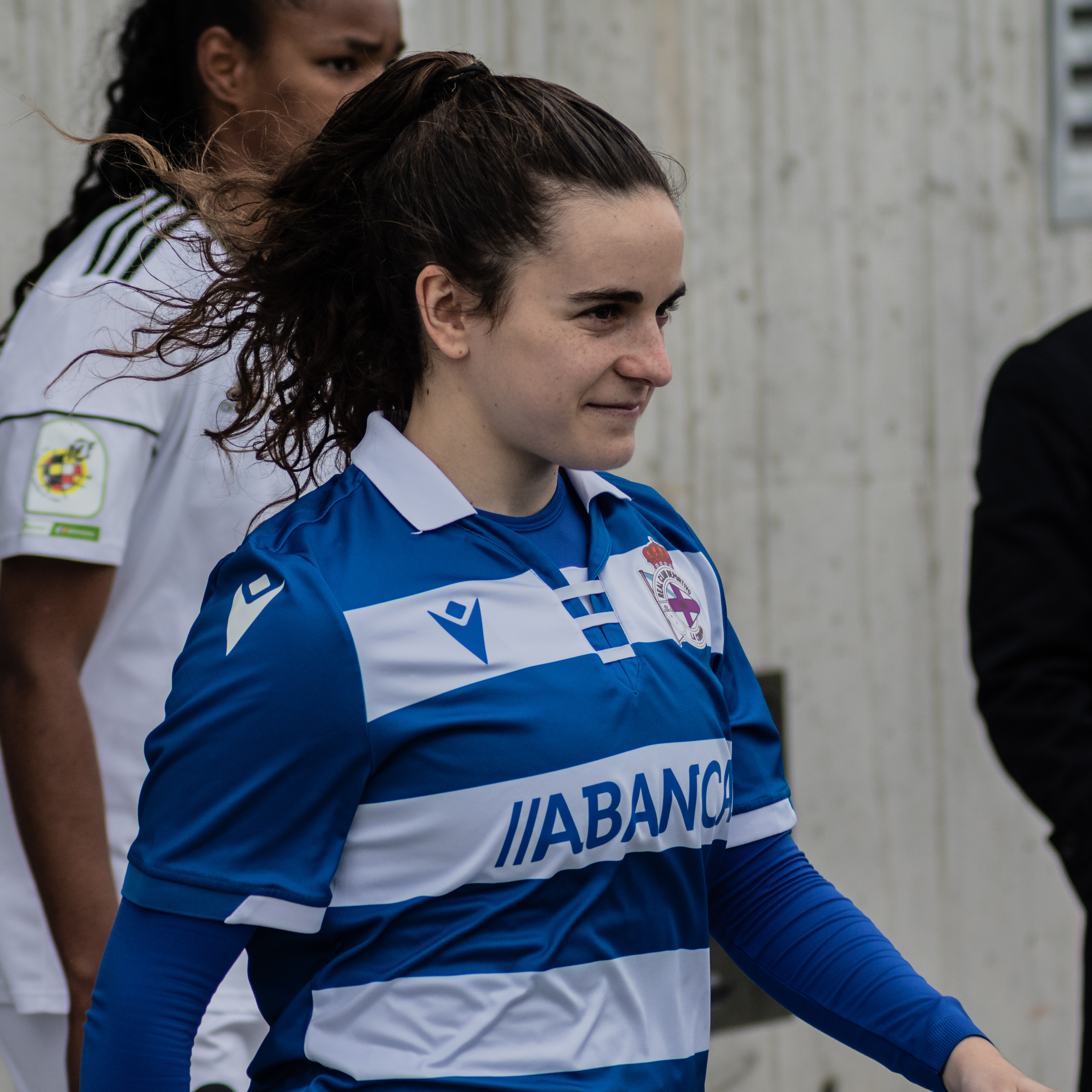 Teresa Abelleira Dueñas, jugadora del Deportivo Abanca, en marzo de 2020 antes de su partido frente al CD Tacón.